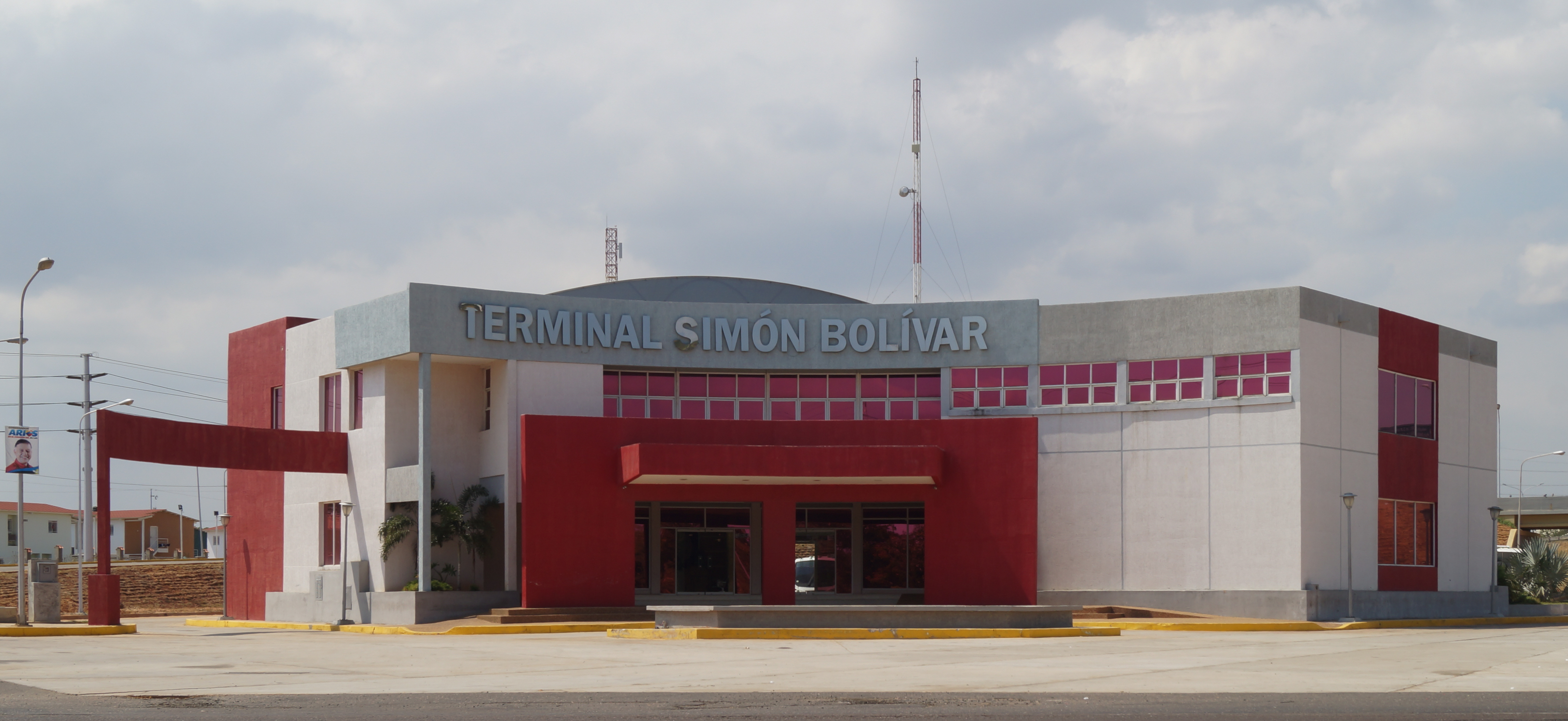 Transporte terrestre utilizado para el traslado de usuarios hacia las diferentes ciudades en el interior del país. Se ubicado en la avenida 5 del municipio San Francisco. Estado Zulia. Venezuela